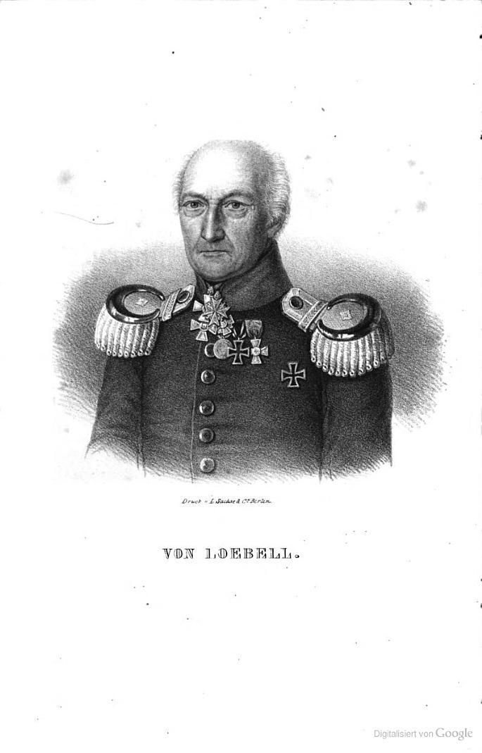 Portrait of General Karl Georg von Loebell